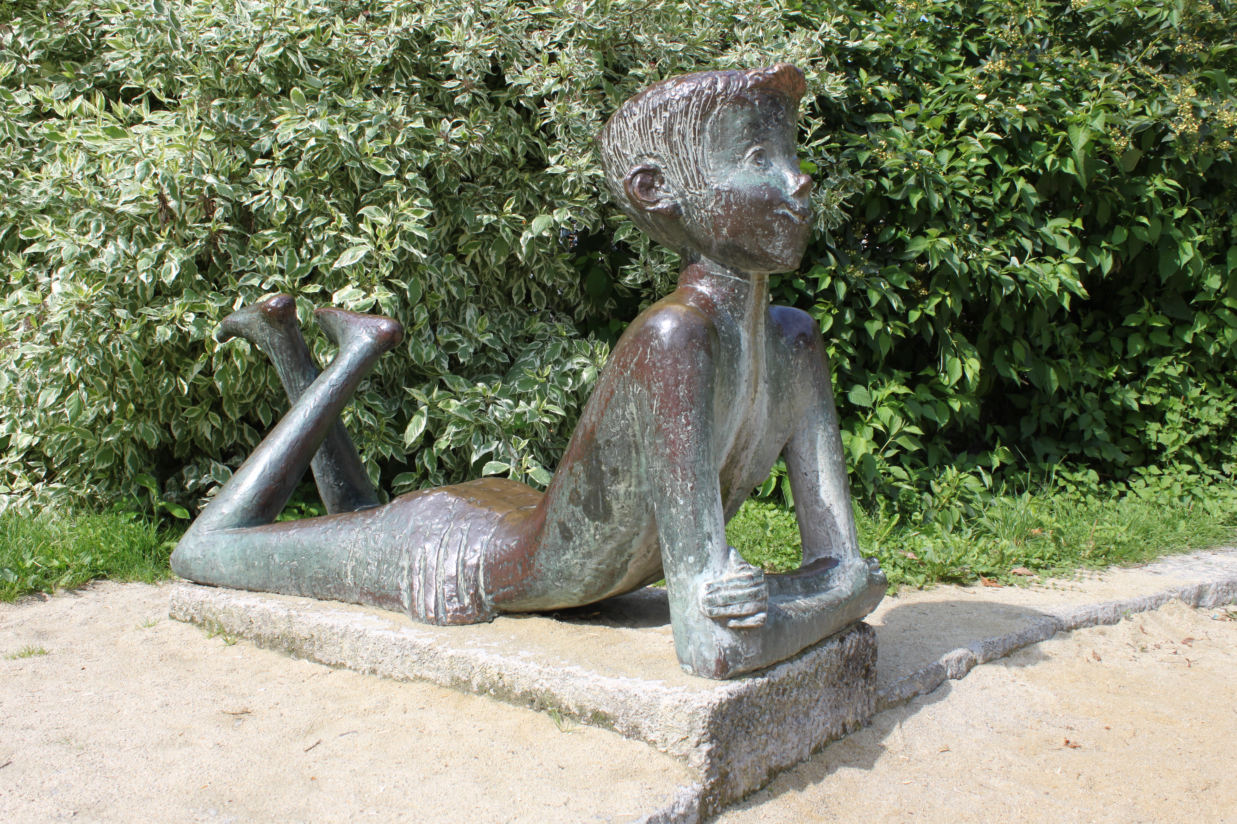 Lausbub, Bronzeplastik, vorne seitlich